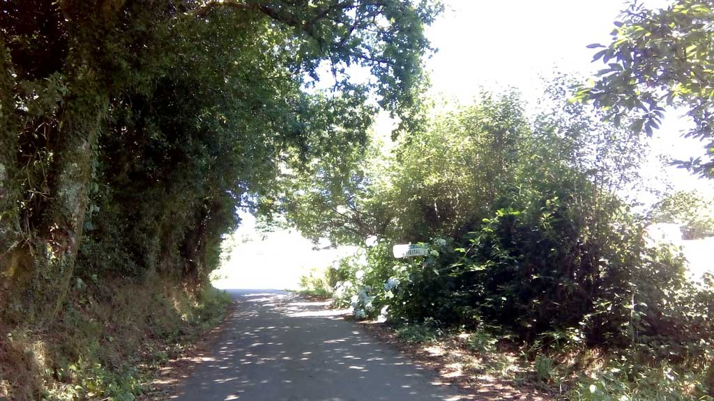 Vista do Fieital, Curtis.